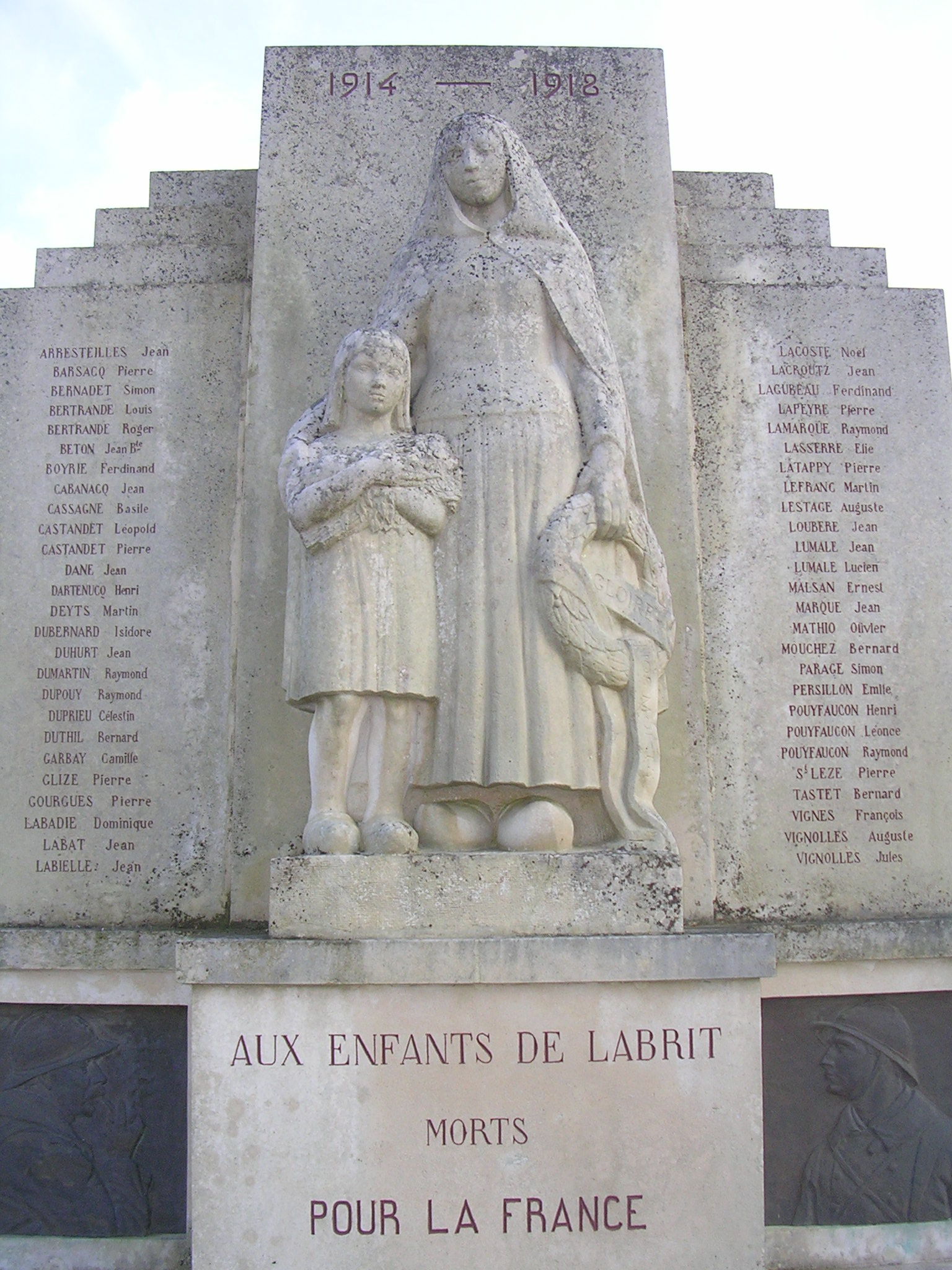 La Landaise au capulet, oeuvre de Robert Wlérick, monument aux morts de labrit, dans le département français des Landes